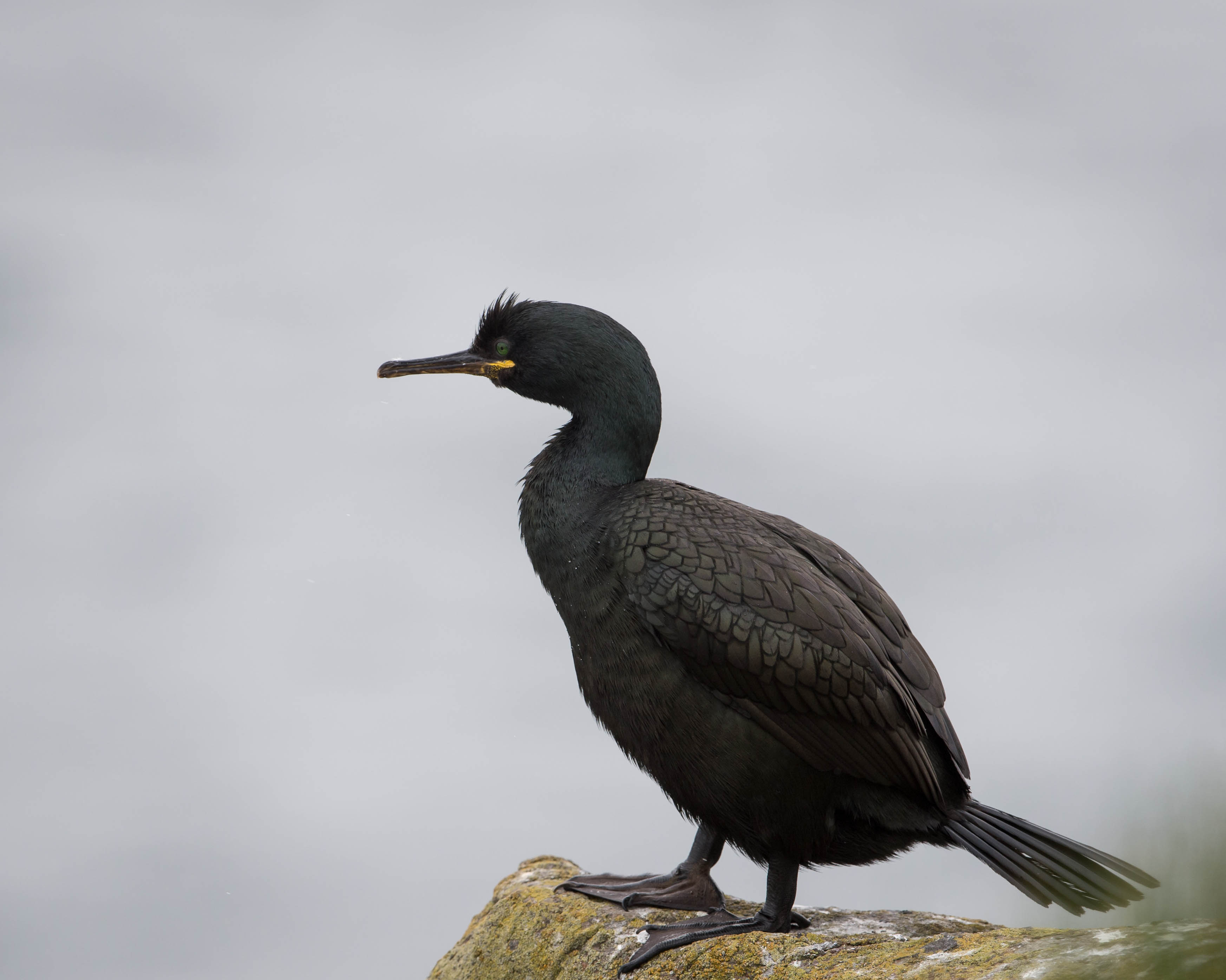 Phalacrocorax aristotelis, UK